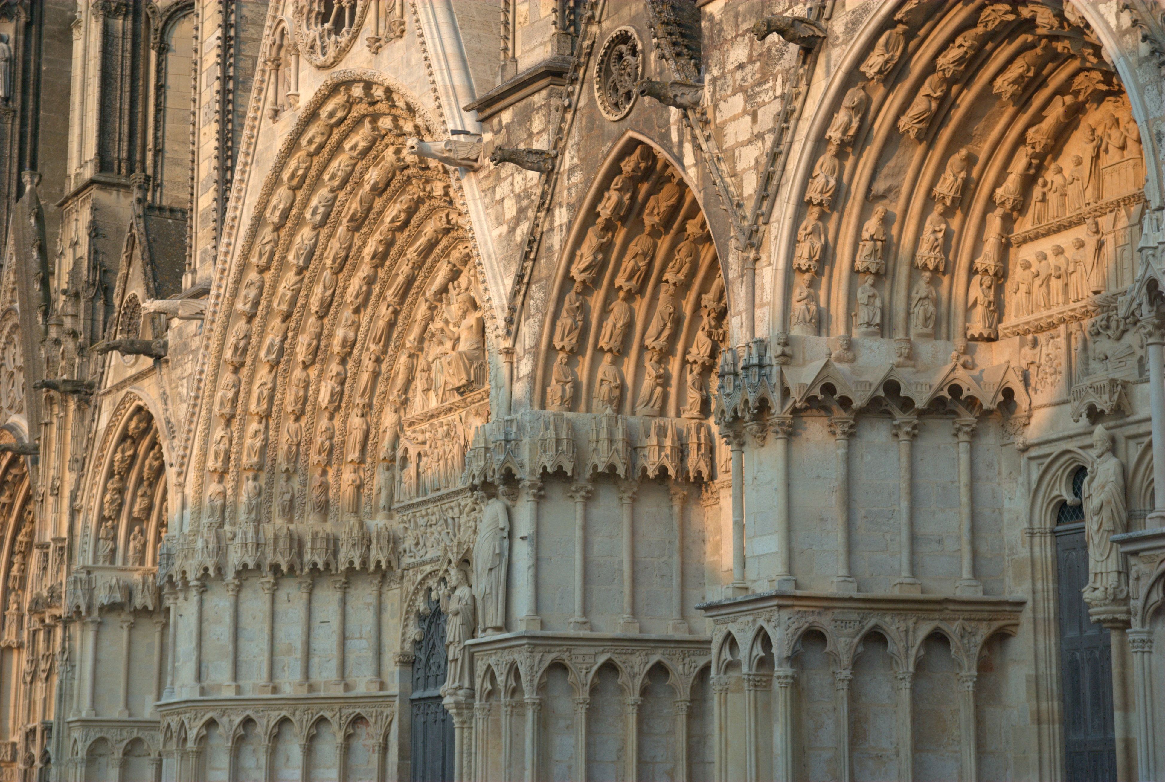 Bourges, Cathédrale Saint-Étienne .